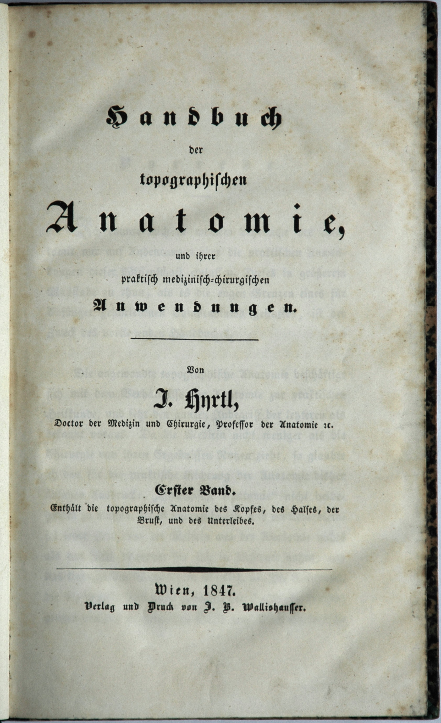 Titelblatt der Erstausgabe